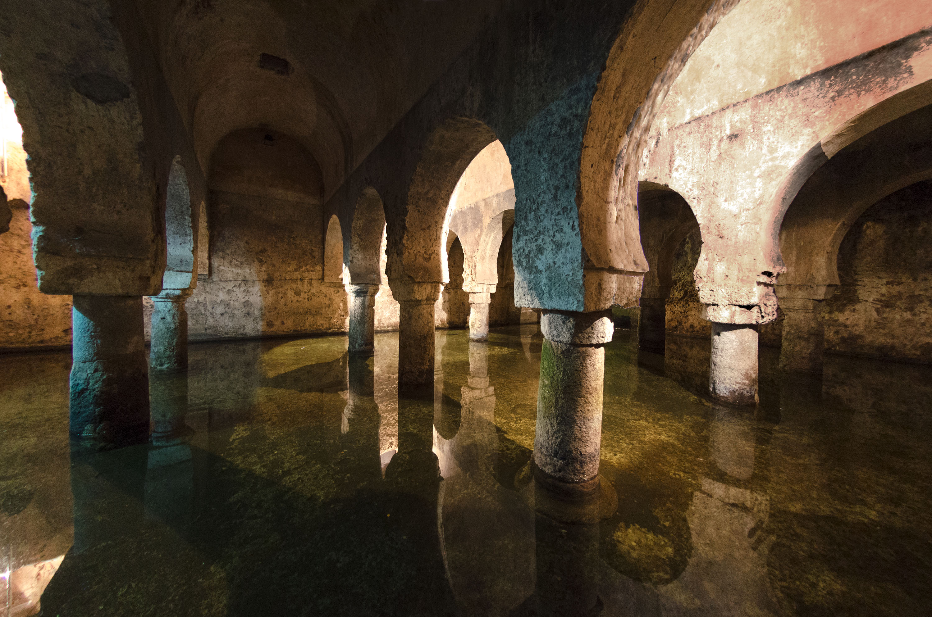 El aljibe data de la segunda mitad del siglo XII, cuando una construcción anterior, posiblemente una mezquita, fue sellada y cubierta con bóvedas. El palacio actual (Casa de las Veletas) es de los siglos XVI a XVIII. Fue construido sobre una casa fuerte bajomedieval que, a su vez, lo había sido en el siglo XV sobre una arruinada alcazaba almohade. Más información en